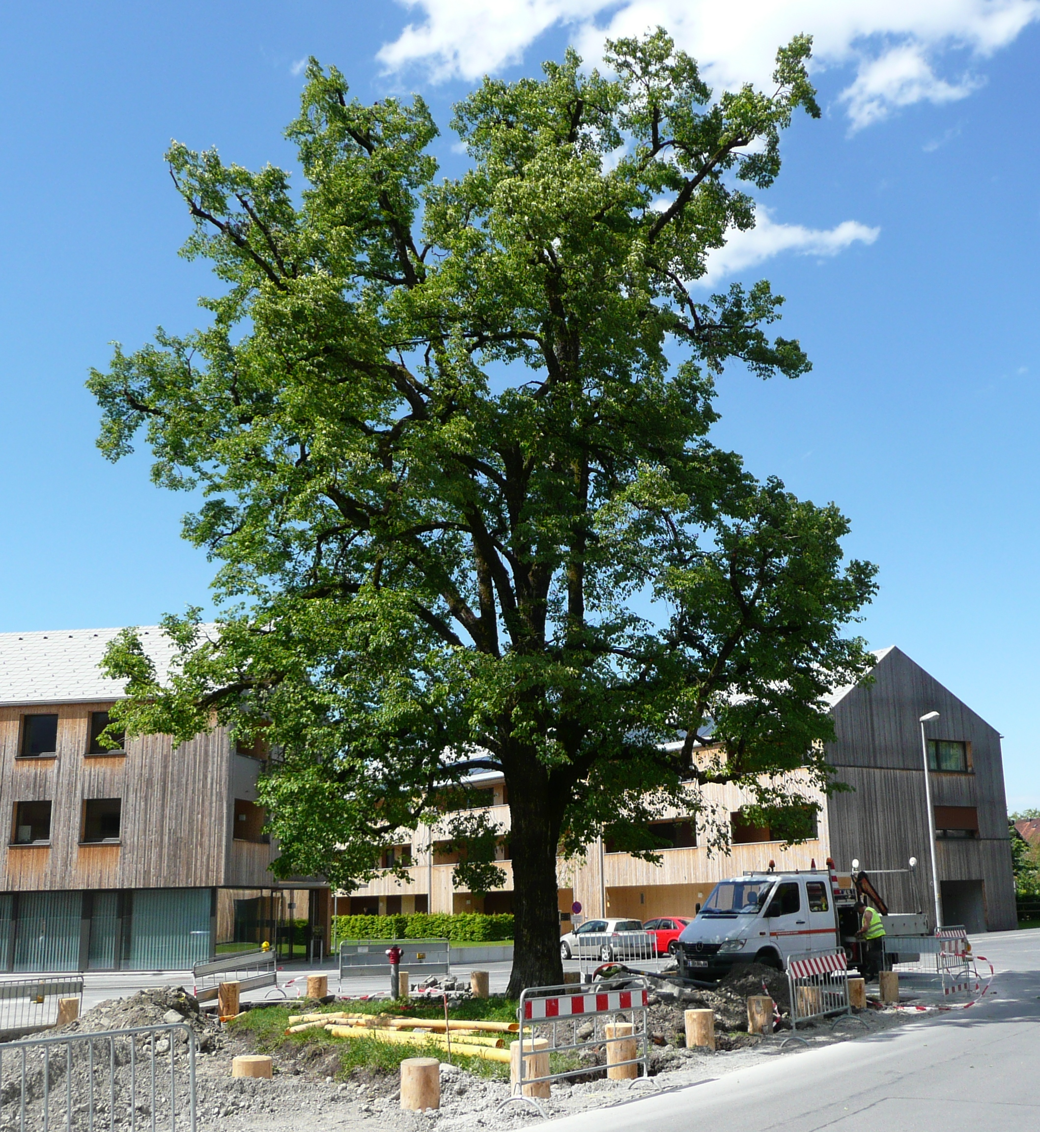 Linde Hintere Achmühle This media shows the natural monument in Vorarlberg with the ID 127.